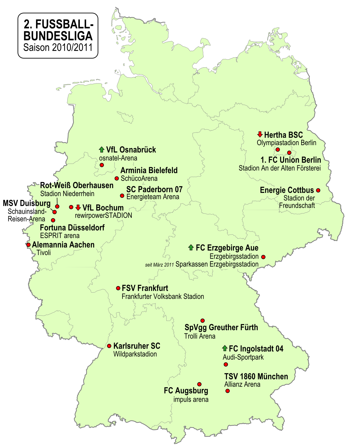 Karte der Vereine der 2. Fußball-Bundesliga-Saison 2010/2011